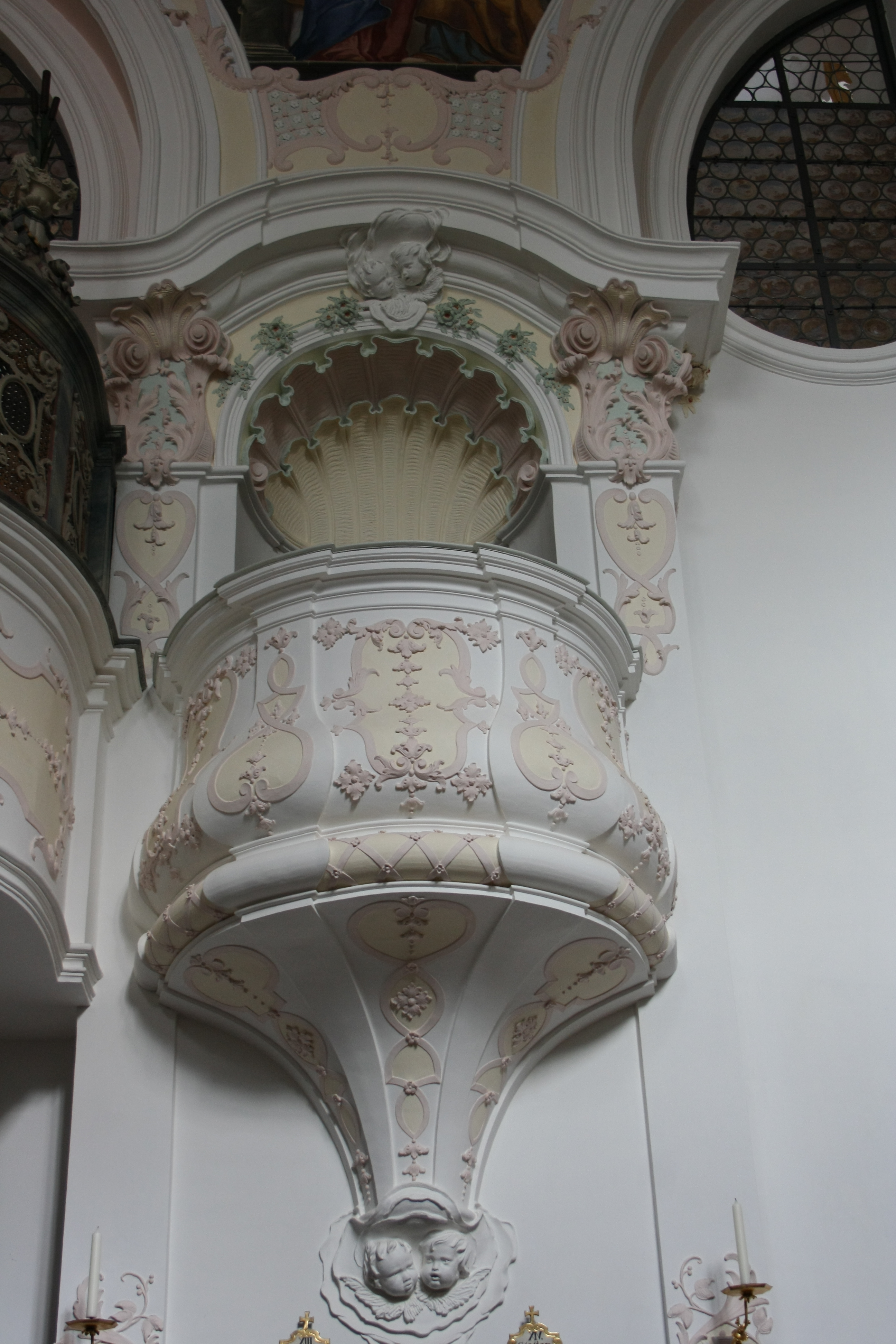 Klosterkirche Mariä Himmelfahrt der Dillinger Franziskanerinnen in Dillingen an der Donau, Rokokokanzel von Franz Xaver Kleinhans (1699–1776)